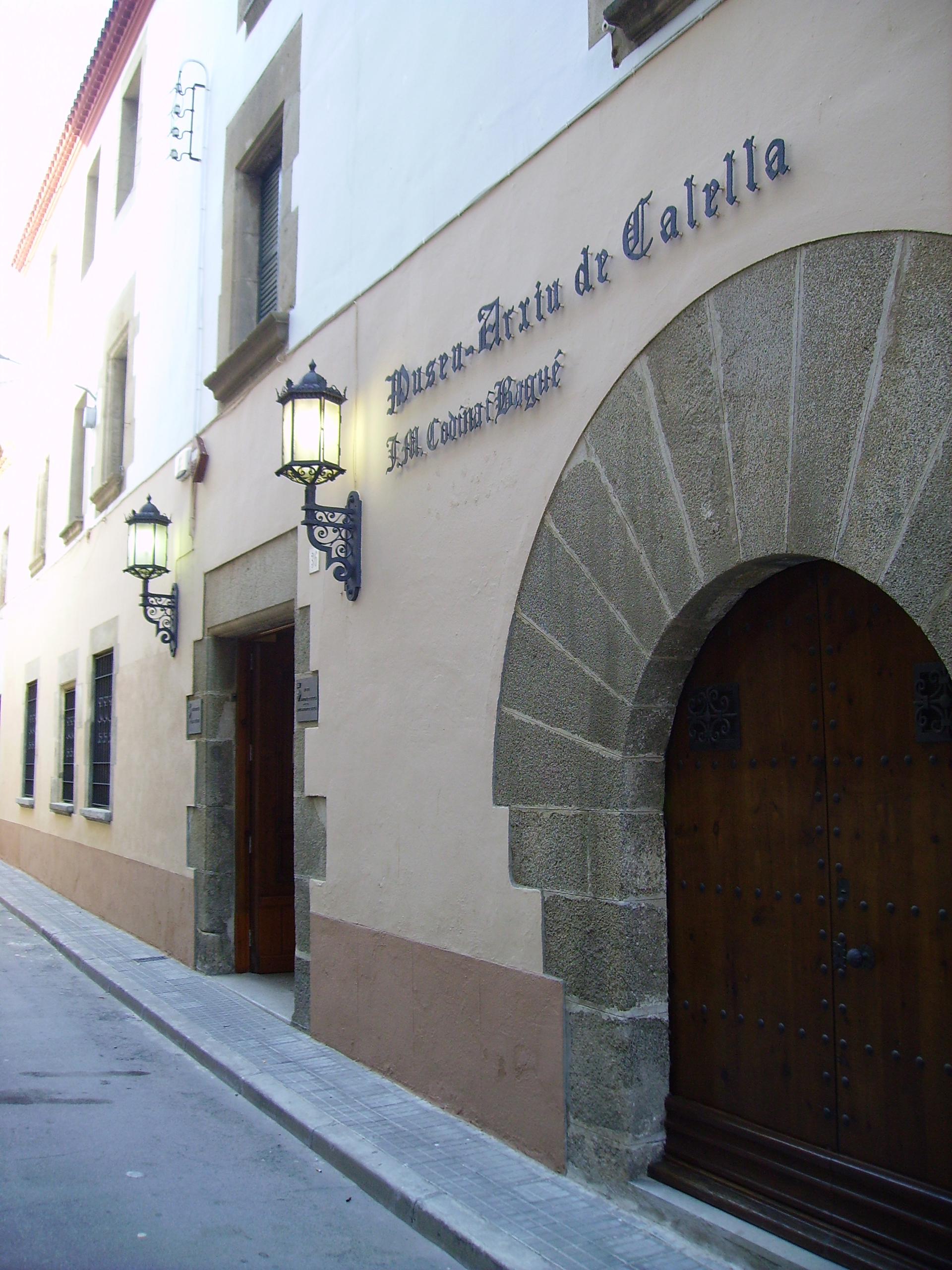 Museu-Arxiu de Calella, el Maresme, Catalunya.